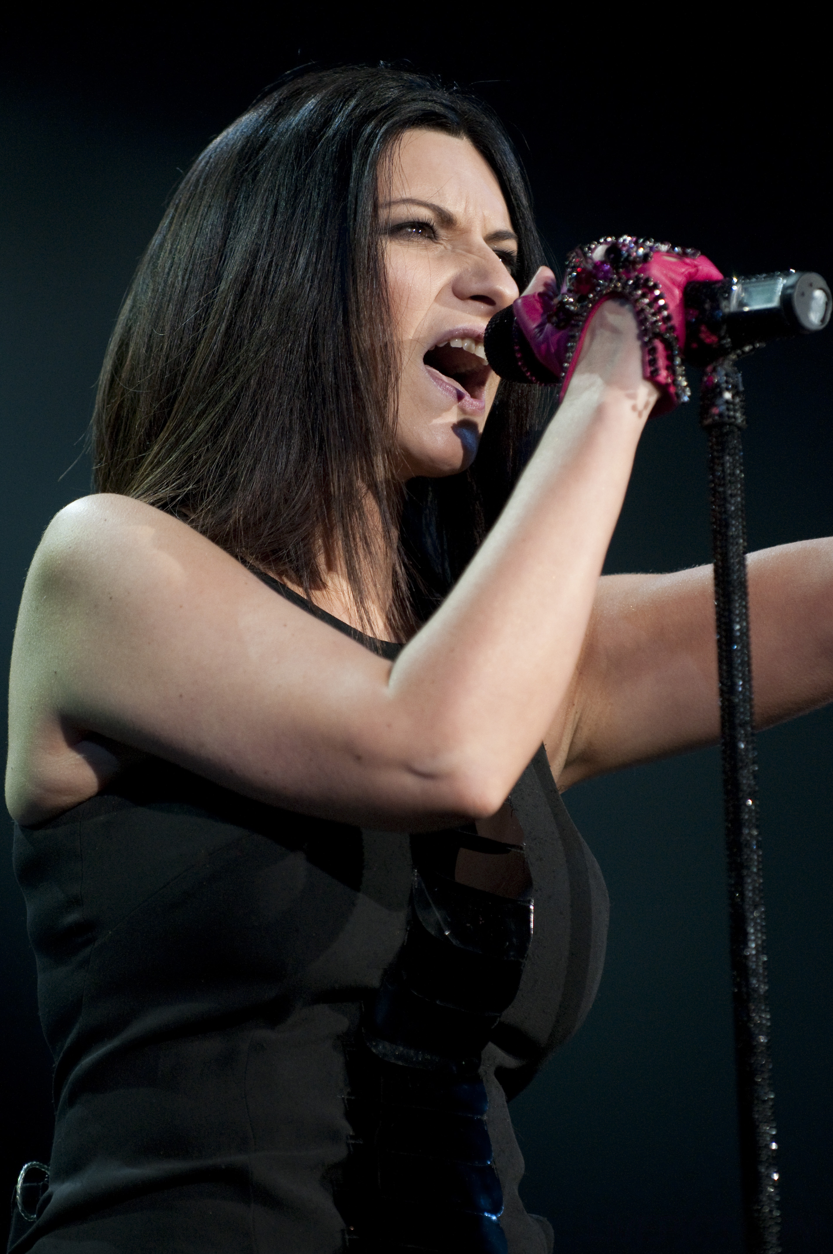 Laura Pausini